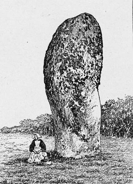 Le menhir géant de Kerdeff à Carnac (Morbihan) dssiné par Joseph Déchelette vers 1908